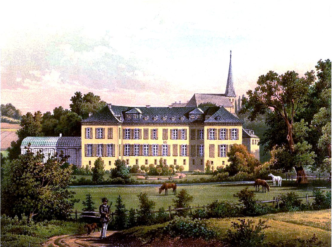 Schloss Crassenstein, Lithografie aus dem 19. Jahrhundert